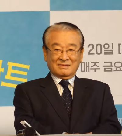 16일 오전 서울시 마포구 도화동 베스트웨스턴프리미어 서울가든호텔에서 tvN 새 금요드라마 '쌉니다 천리마마트' 제작발표회가 열려 배우 가 참석해 포토타임을 갖고 있다.